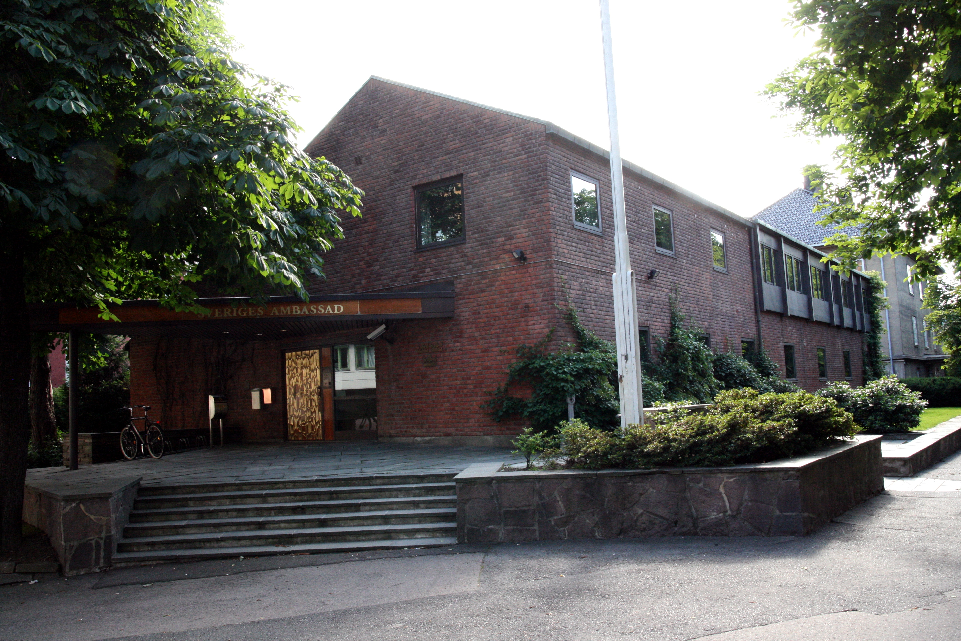 Sveriges ambassade i Oslo, Nobels gate 16b på Frogner.